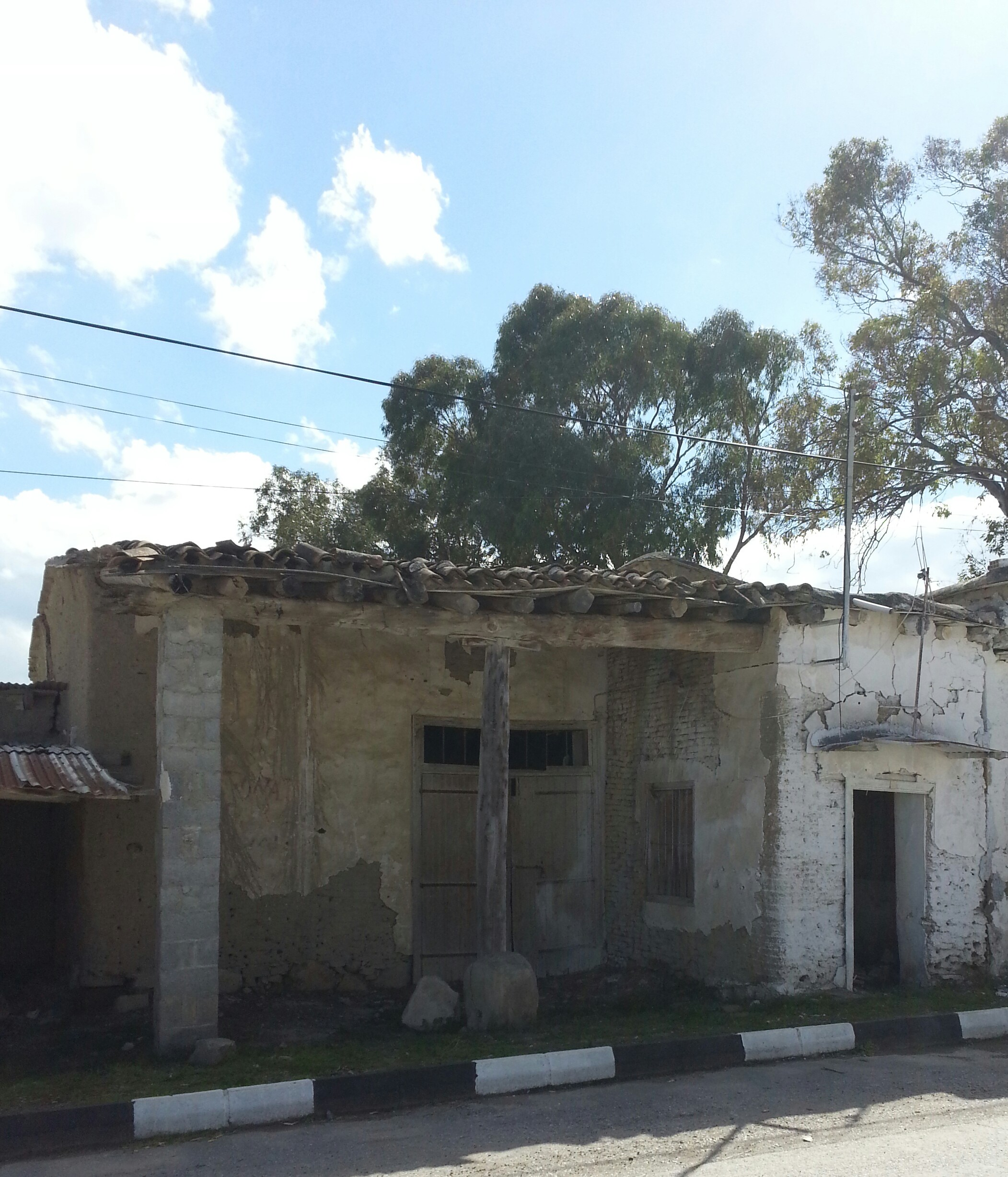 Gönendere'de eski evler